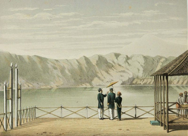 Litho. Litho naar een oorspronkelijke aquarel van J.C. Rappard.. Het meer Telaga Bodas